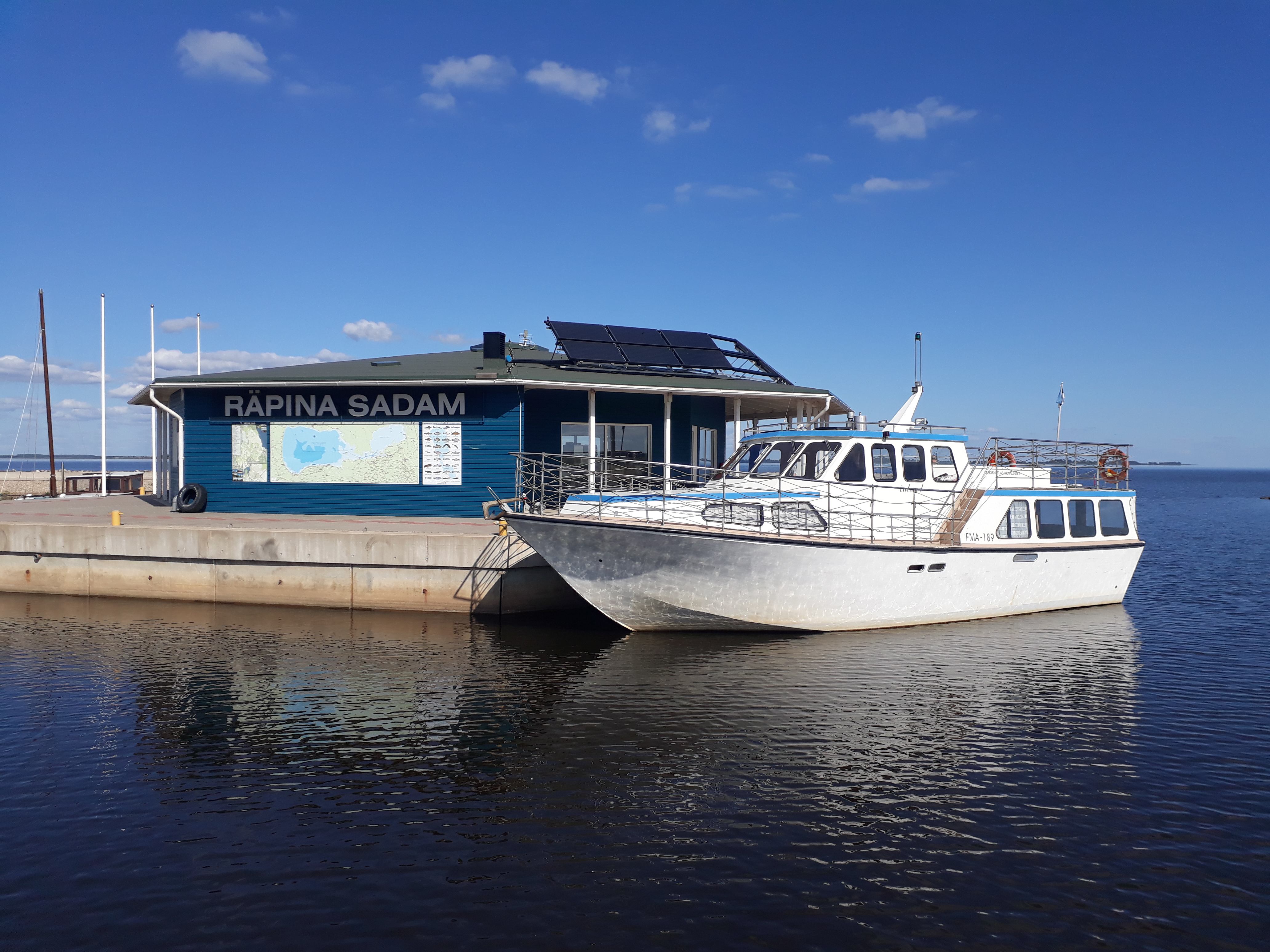 Räpina sadamahoone